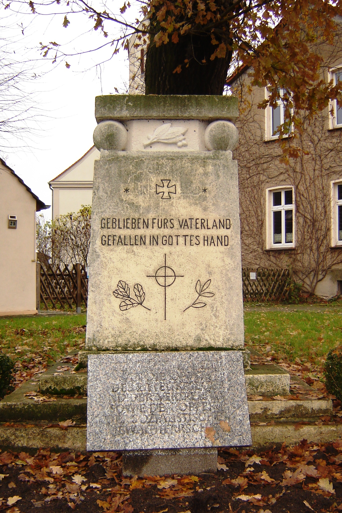 Randau, Kriegerdenmal (Kulturdenkmal)